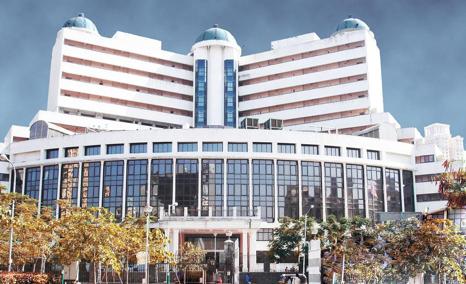 CETTM Hostel